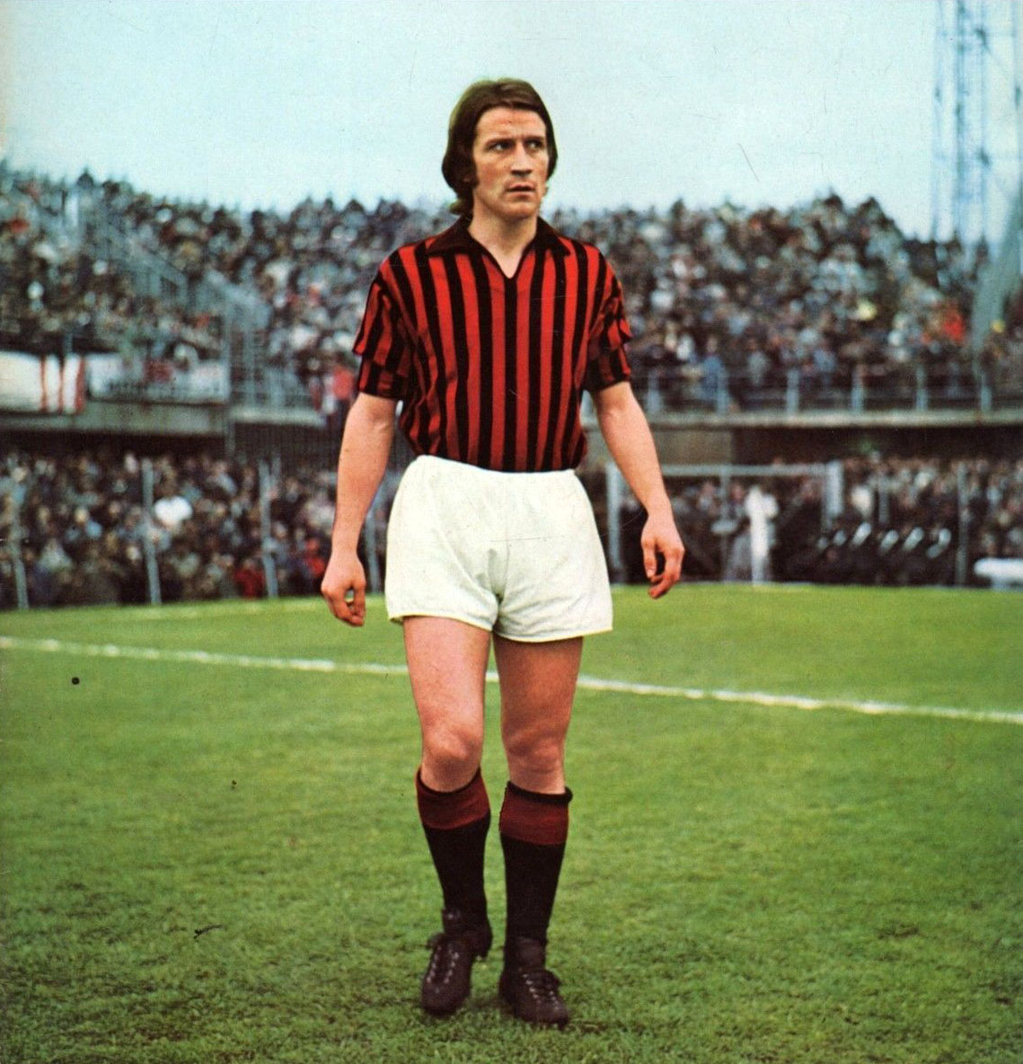 Vicenza, stadio Romeo Menti, 21 marzo 1971. Il calciatore rossonero Giulio Zignoli prima del fischio d'inizio della sfida tra L.R. Vicenza e Milan (1-1) valevole per la 22ª giornata del campionato italiano di Serie A 1970-71.